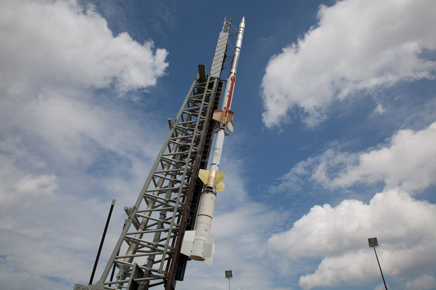 Launch preparation of the maiden Talos Terrier Oriole sounding rocket at Wallops Island on 22 September 2012